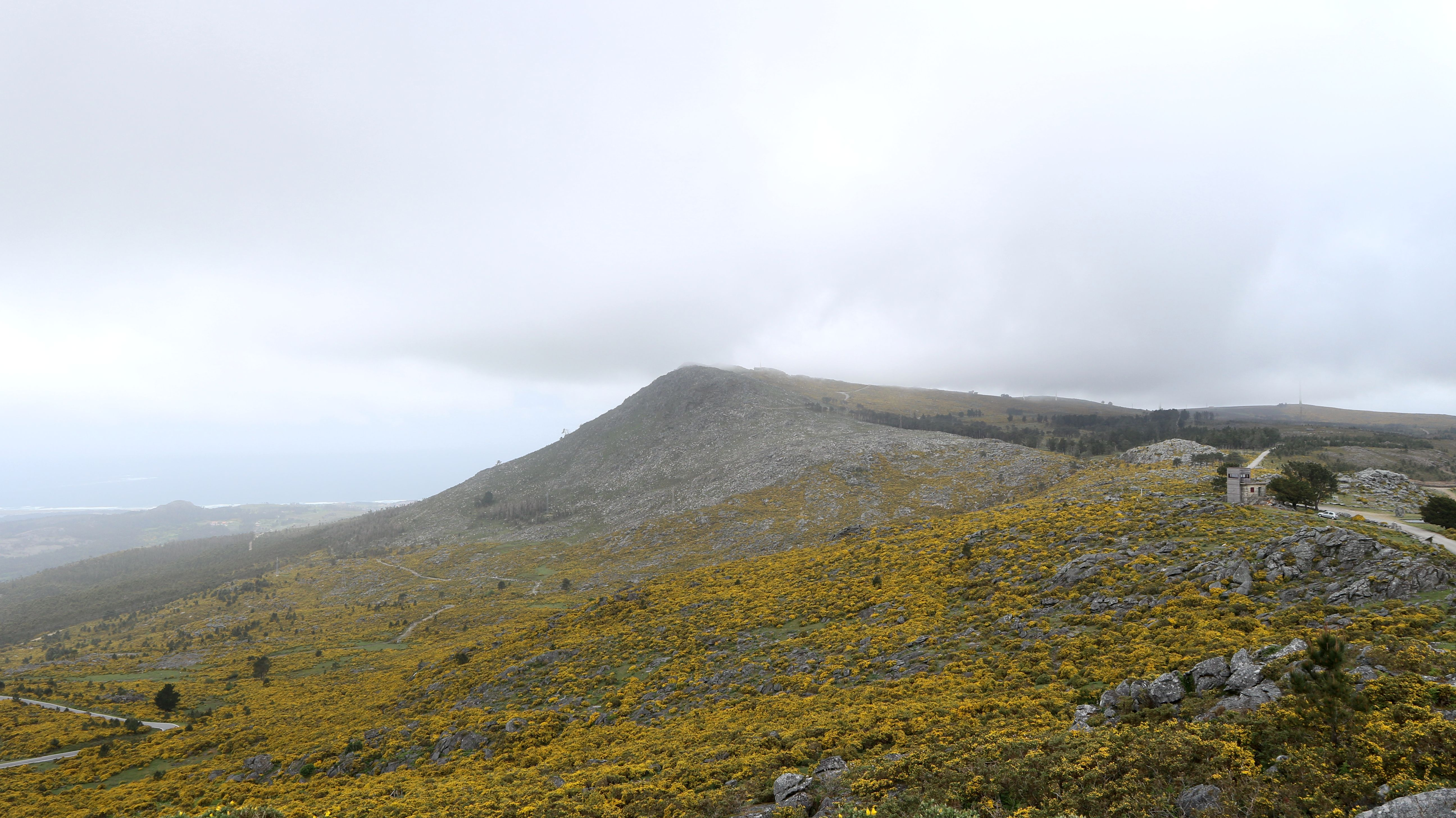 Monte da Curotiña, Ribeira.